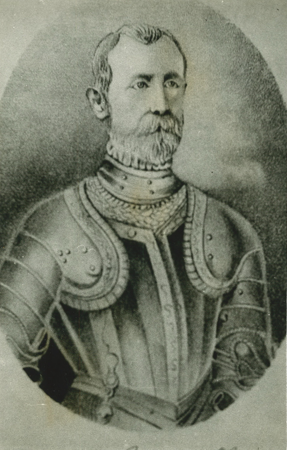 La imagen es la fotografia de un dibujo de Francisco de Aguirre de Meneses.